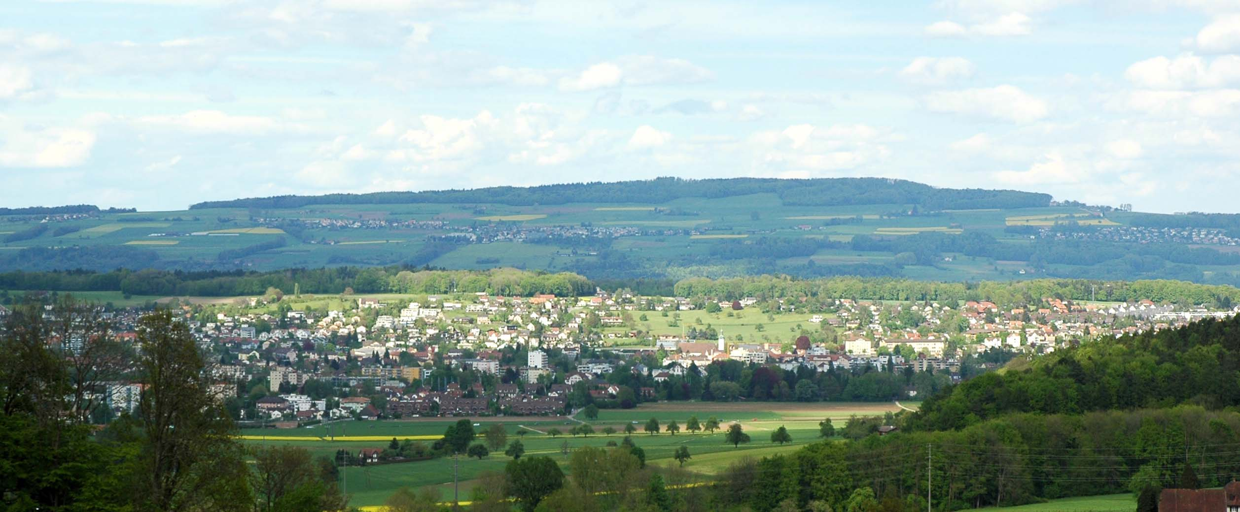 Wohlen im Kanton Aargau, aufgenommen vom Sandbühl bei Hilfikon